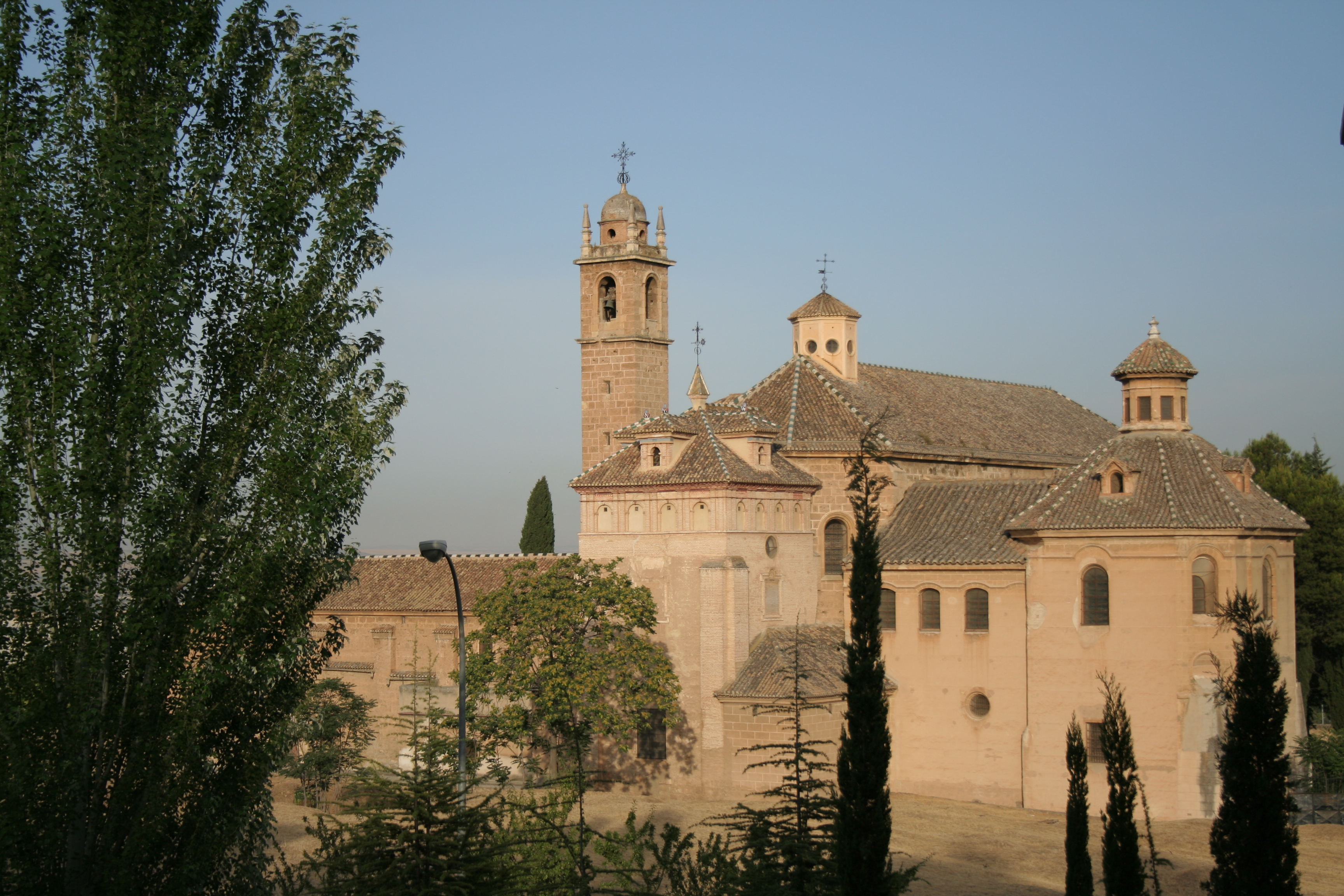 Monasterio ubicado en el campus La Cartuja de la Universidad de Granada, España.